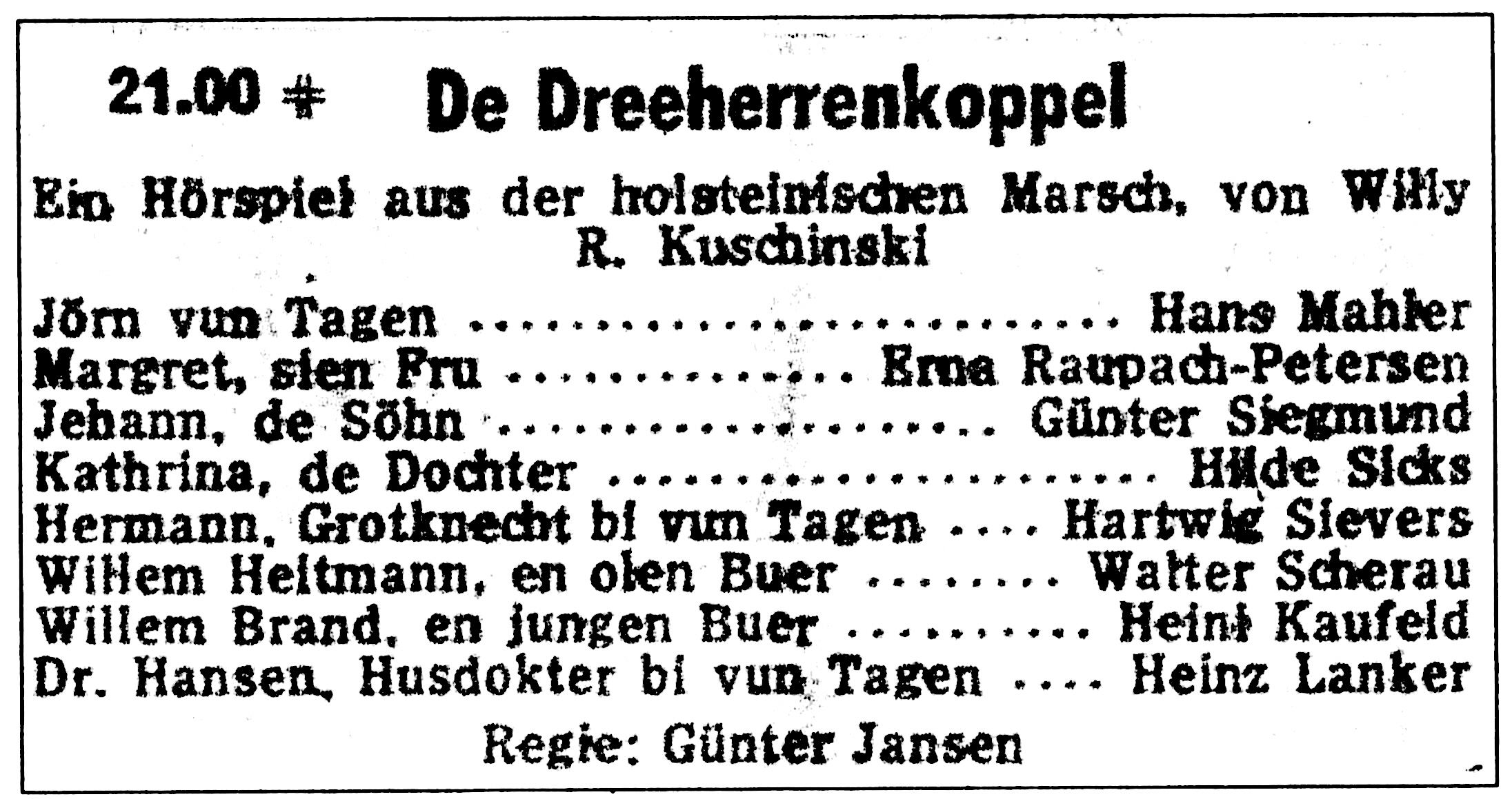 Programmanzeige "De Dreeherrenkoppel" von Willy R. Kuschinski, Uetersener Hörspielautor und Dichter